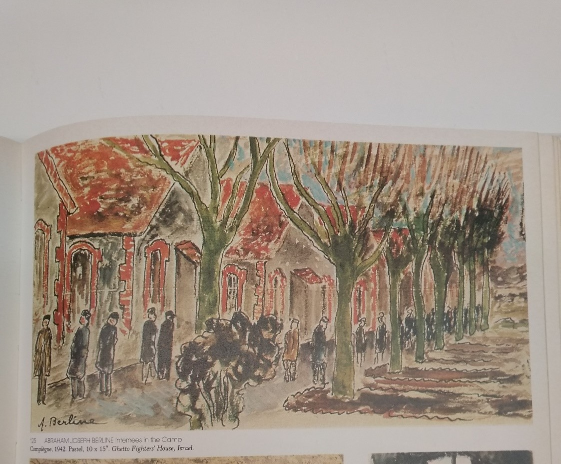 .בתמונה ציורו של האמן אברהם יוסף ברלין. שם התמונה הוא שבויים במחנה